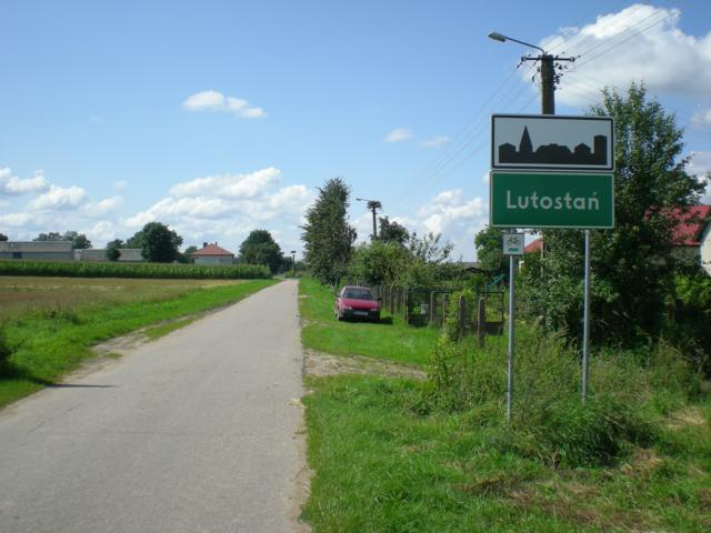 Lutostań - tablica informacyjna z nazwą wsi